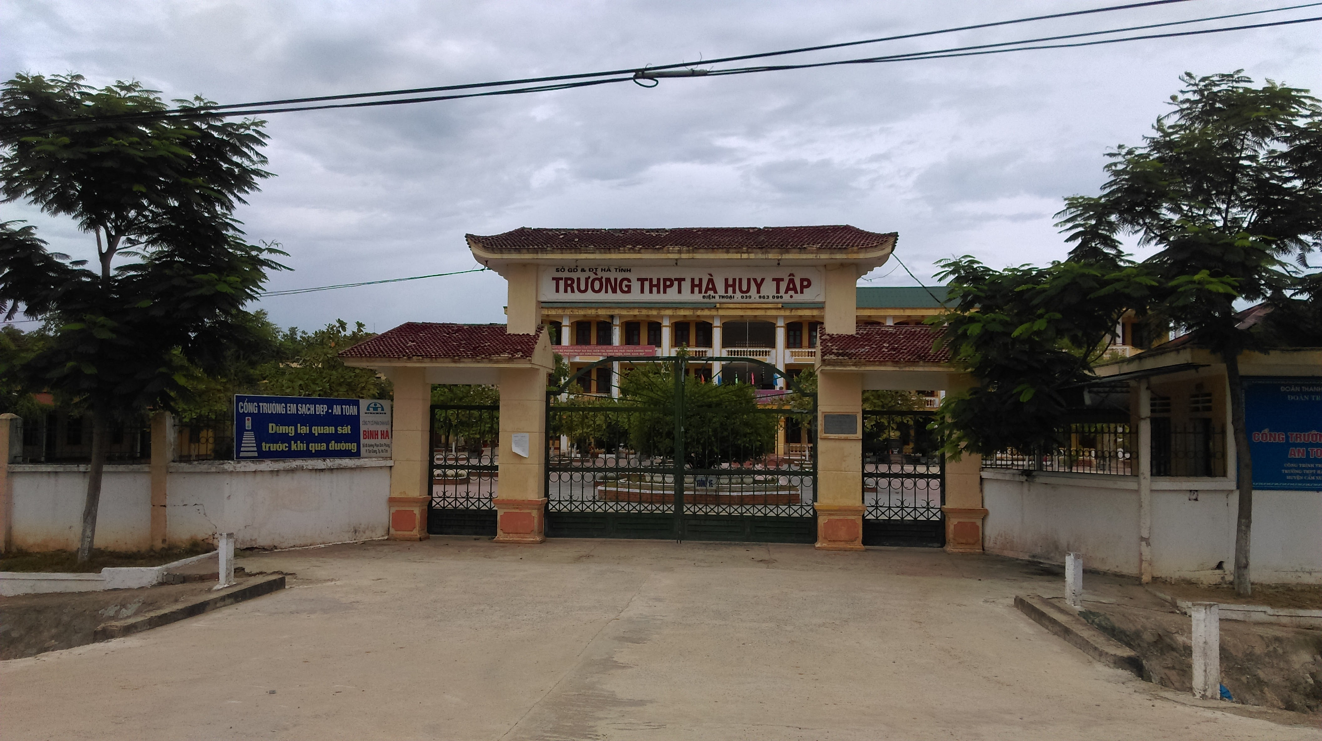 Trường THPT Hà Huy Tập, Cẩm Sơn, Cẩm Xuyên, Hà Tĩnh